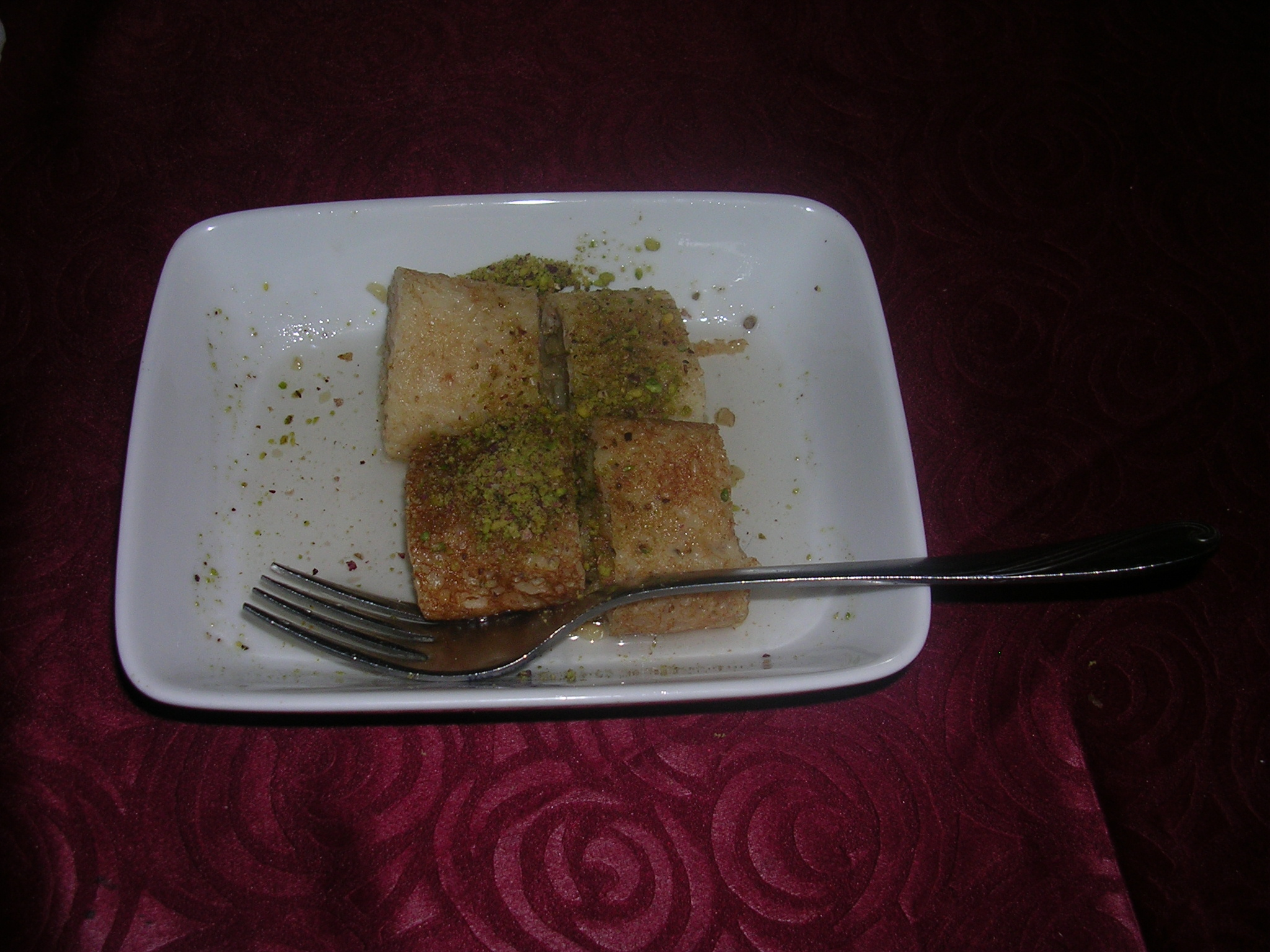 Şıllık tatlısı, Urfa.